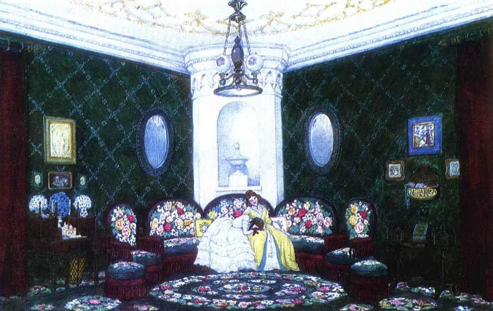 Эскиз декораций и мизансцены к комедии И. С. Тургенева «Месяц в деревне». 1909